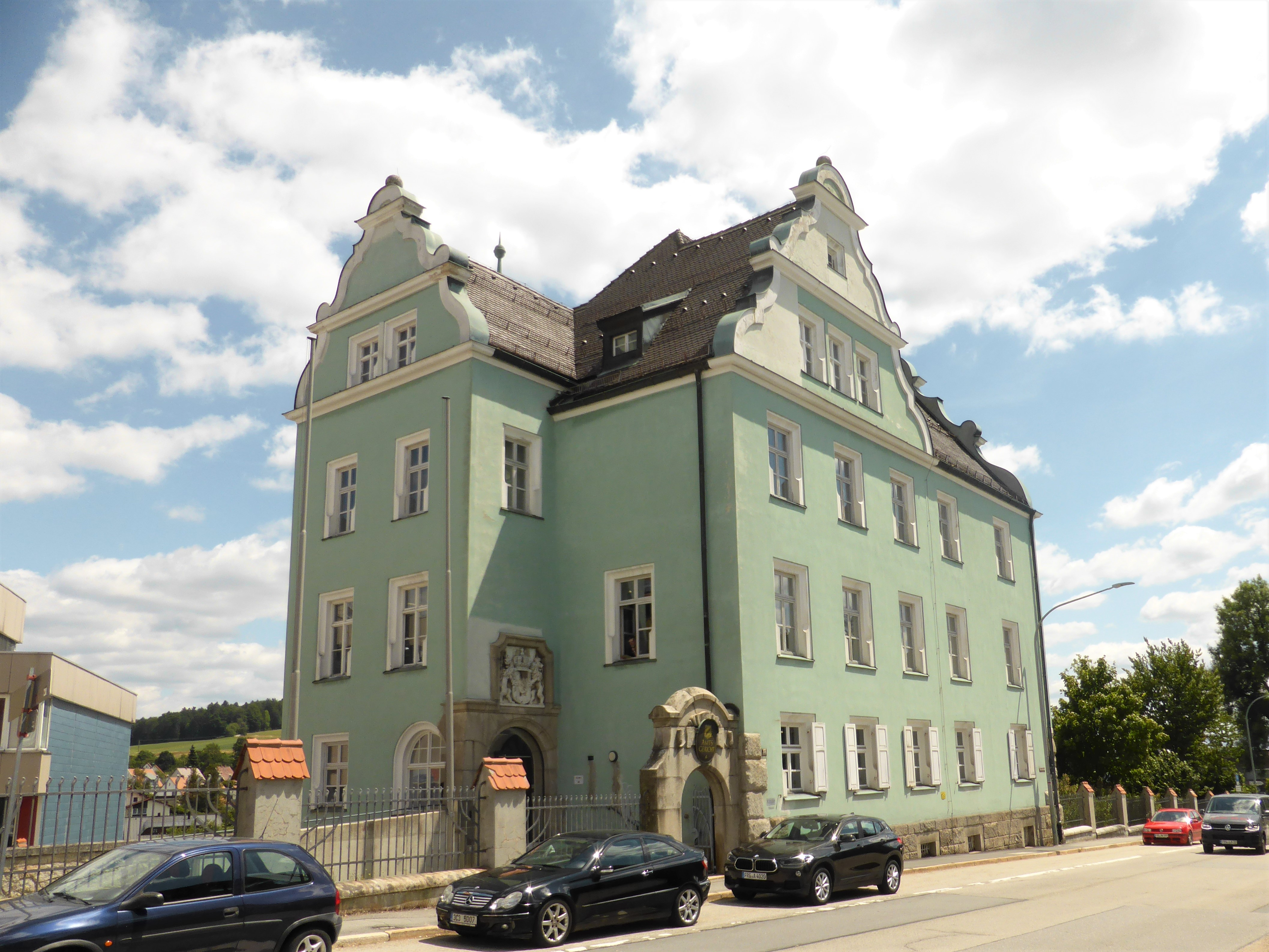 Amtsgericht in Freyung, Bahnhofstr. 15. Dreigeschossiger Steildachbau mit Garteneinfriedung und gemauertem Steinpfeiler.This is a photograph of an architectural monument.